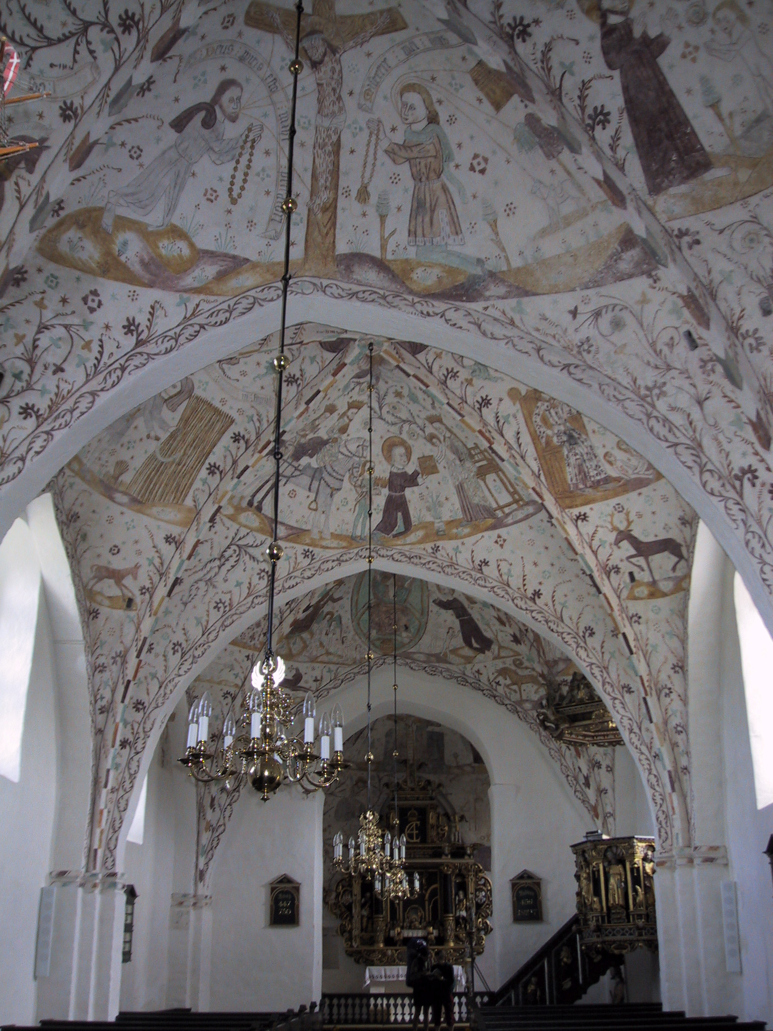 Blick an das Deckengewölbe der Kirche in Elmelunde auf Møn, Fresken des "Elmelunde-Meisters" Sonstiges: ...